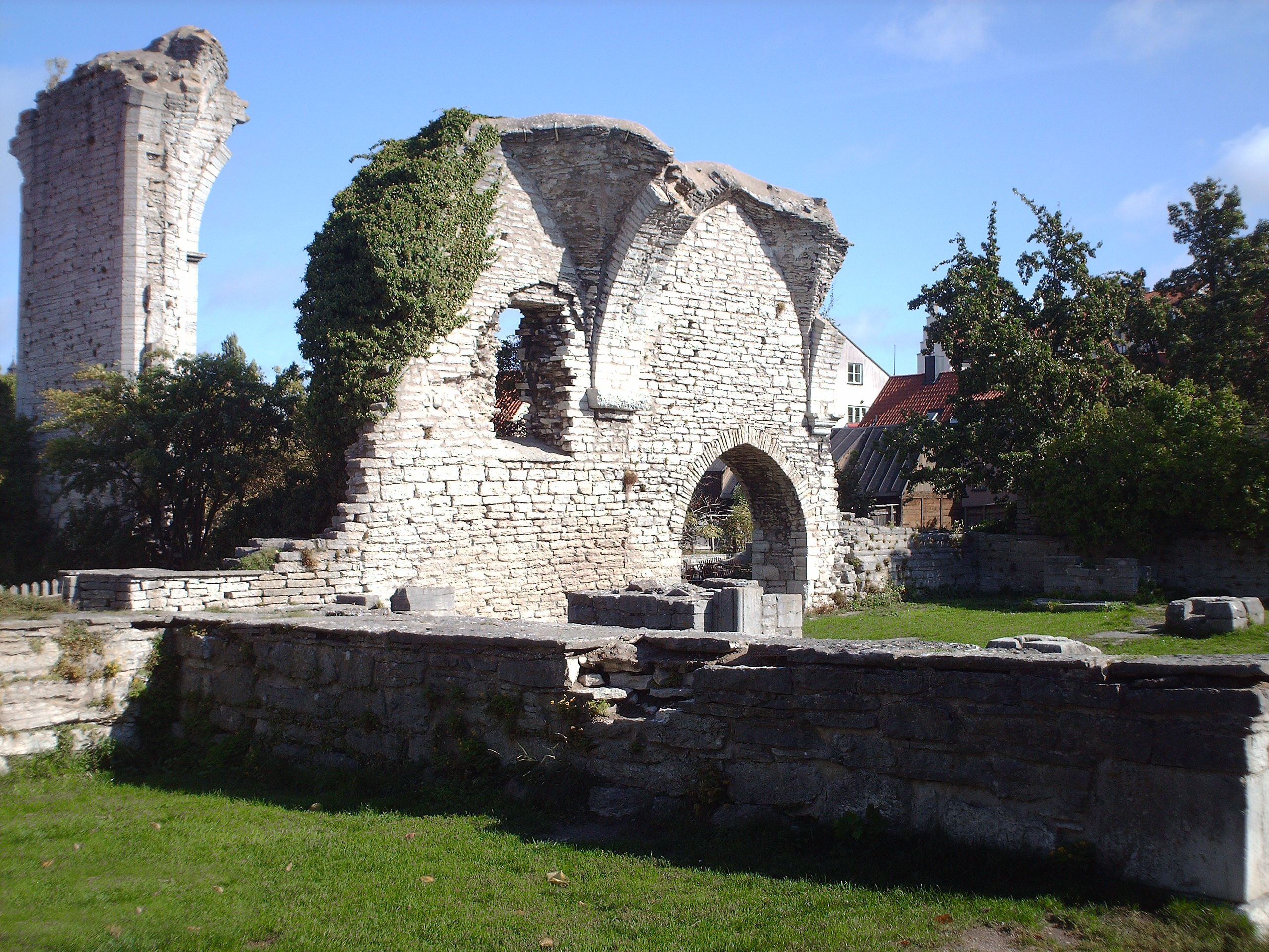 St Hans and St Per Churches, Visby, Sweden.